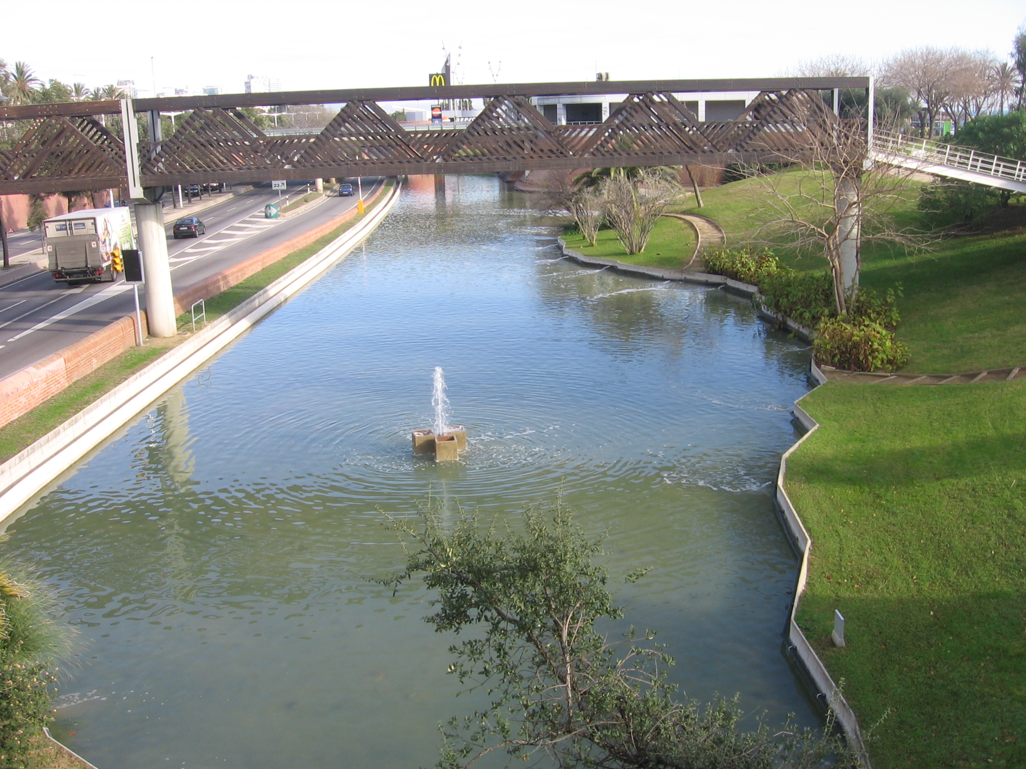 Parque de la Nueva Icaria.